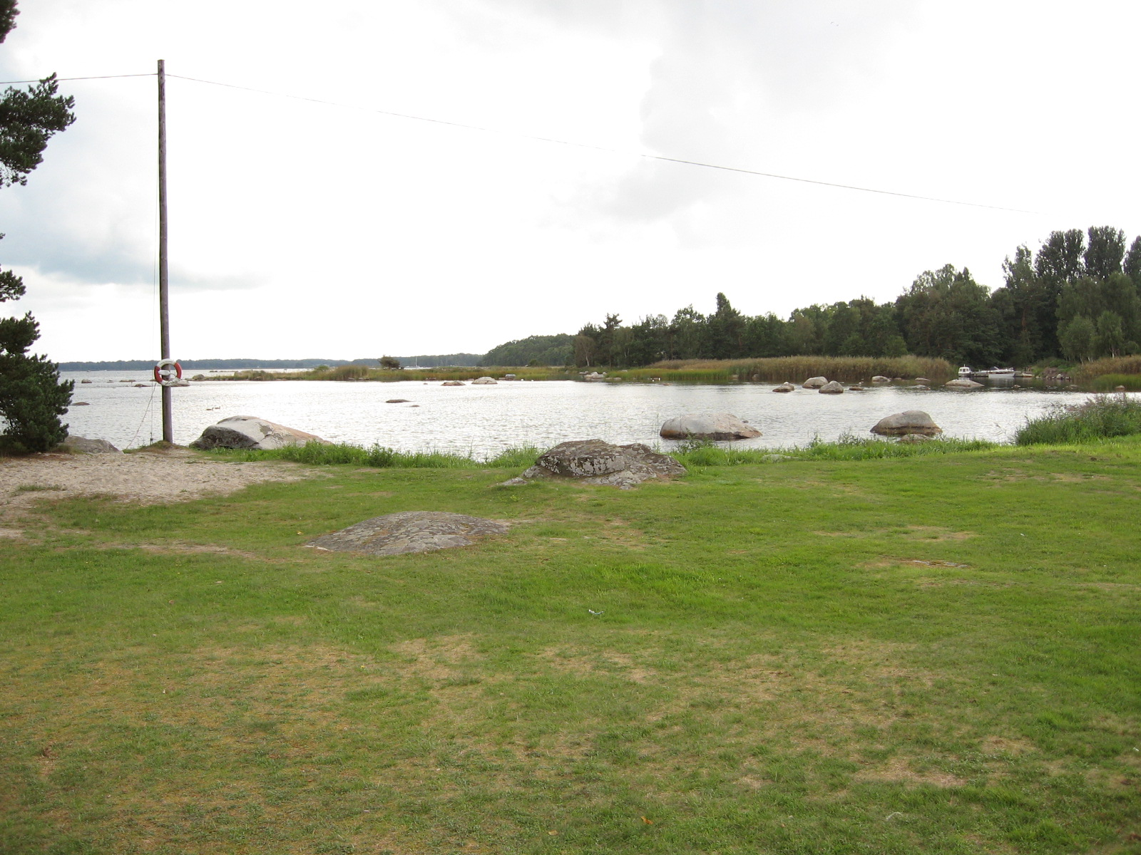 Badplats i Pukavik